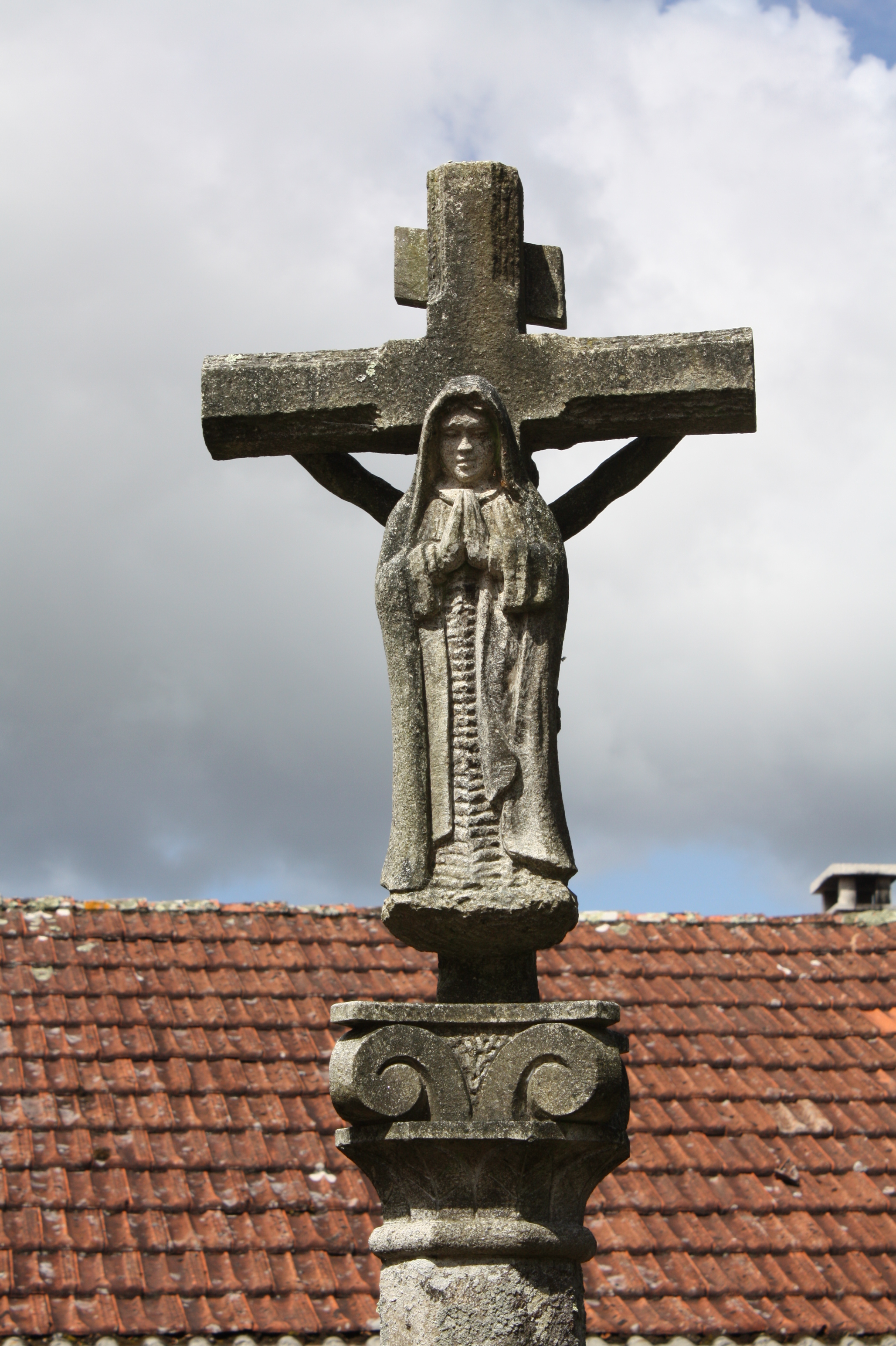 Cruceiro no lugar de Pedroño, parroquia de Nantes, concello de Sanxenxo (Pontevedra)